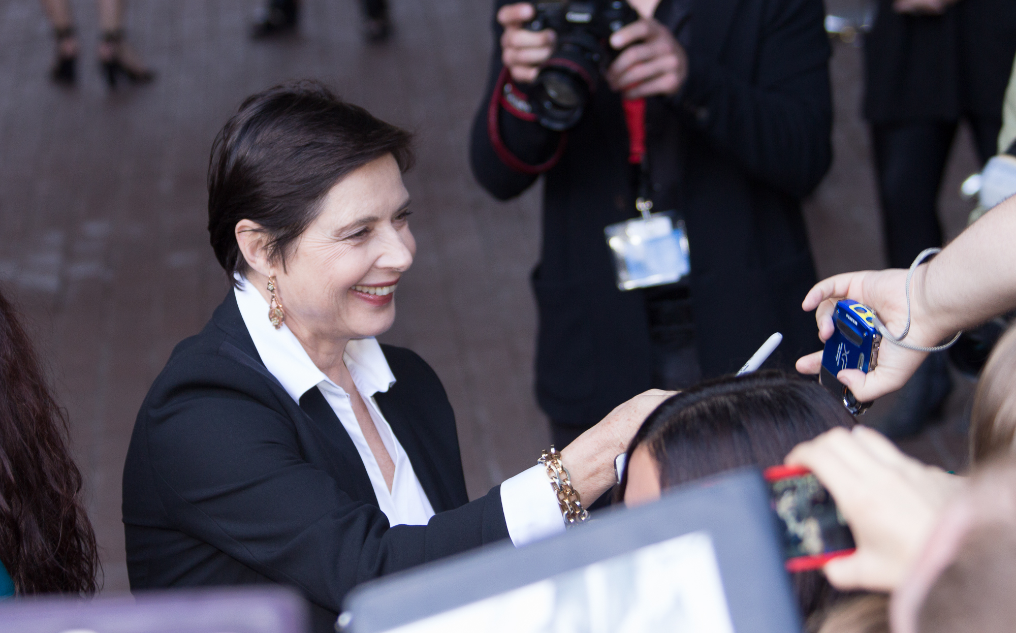 _MG_6830.jpg